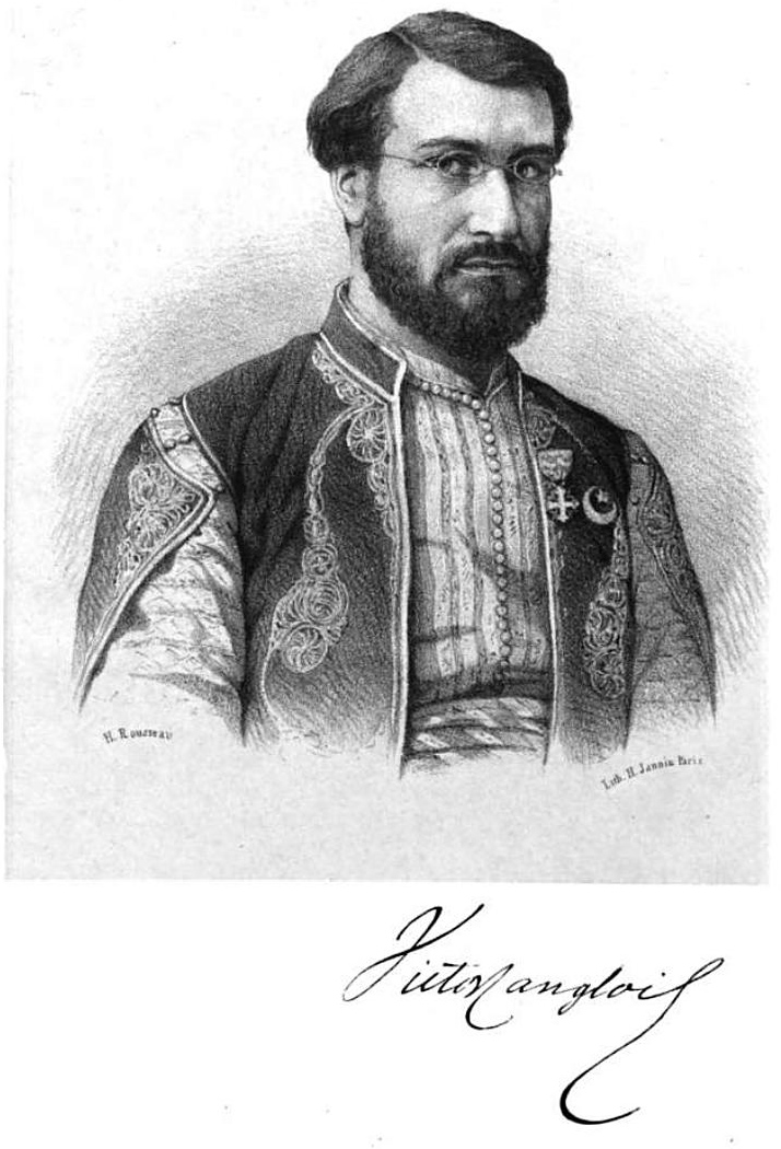 Victor Langlois, französischer Orientalist, Lithographie von H. Jannin nach einer Zeichnung von Henri Rousseau